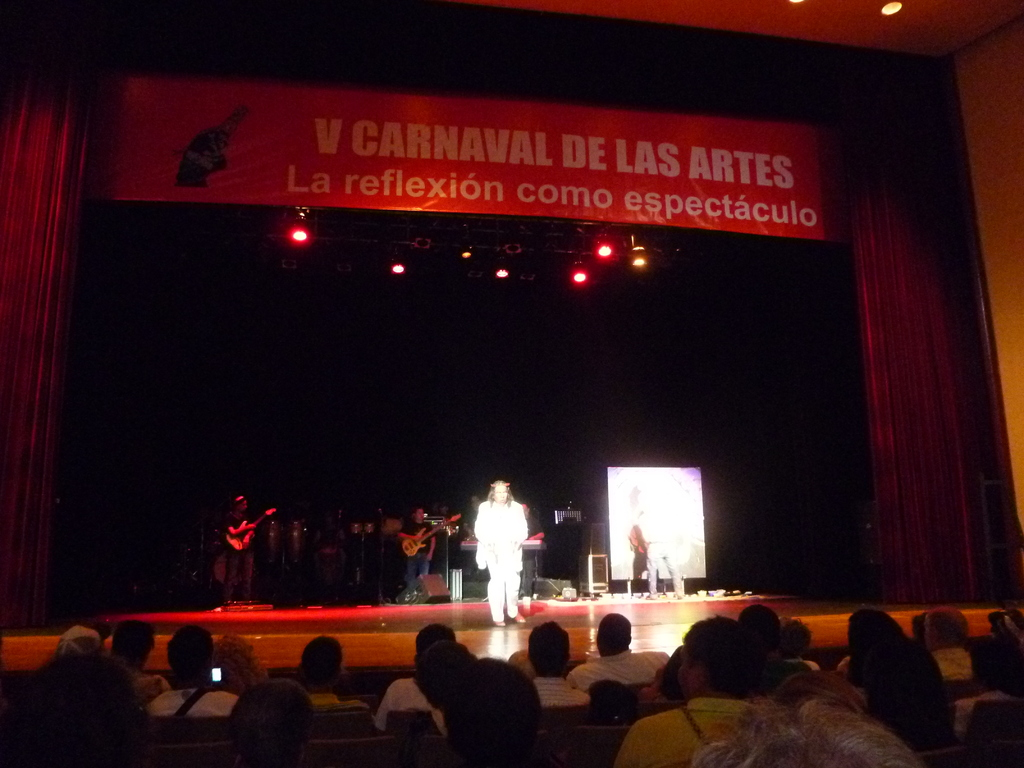 Cinquième Carnaval des Arts de Barranquilla. La réflexion comme spectacle